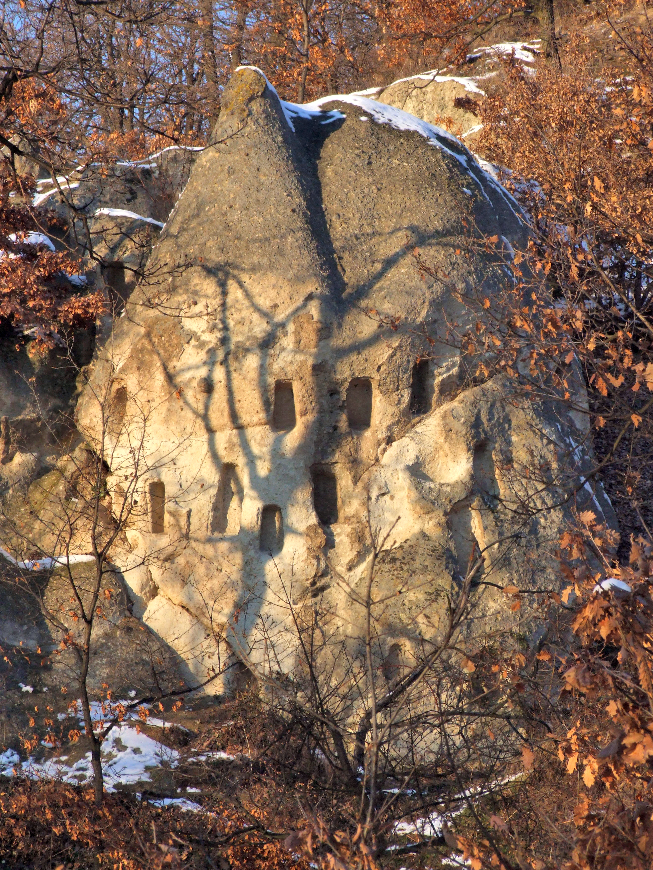 17. Királyszéke, Szomolya, Kaptár-rét, 4. szikla